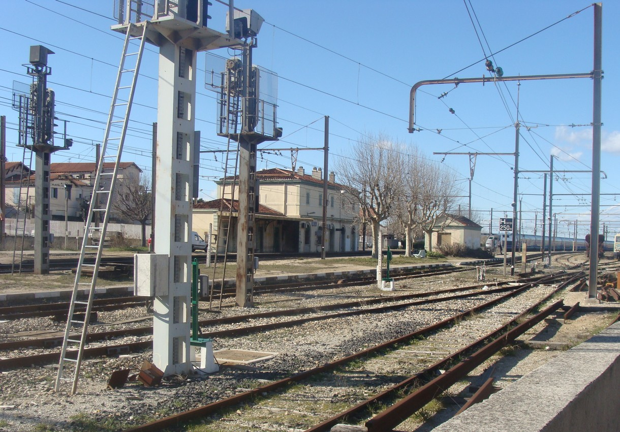 La voie 1bis et les voies de garage est de la gare de Pas-des-Lanciers.